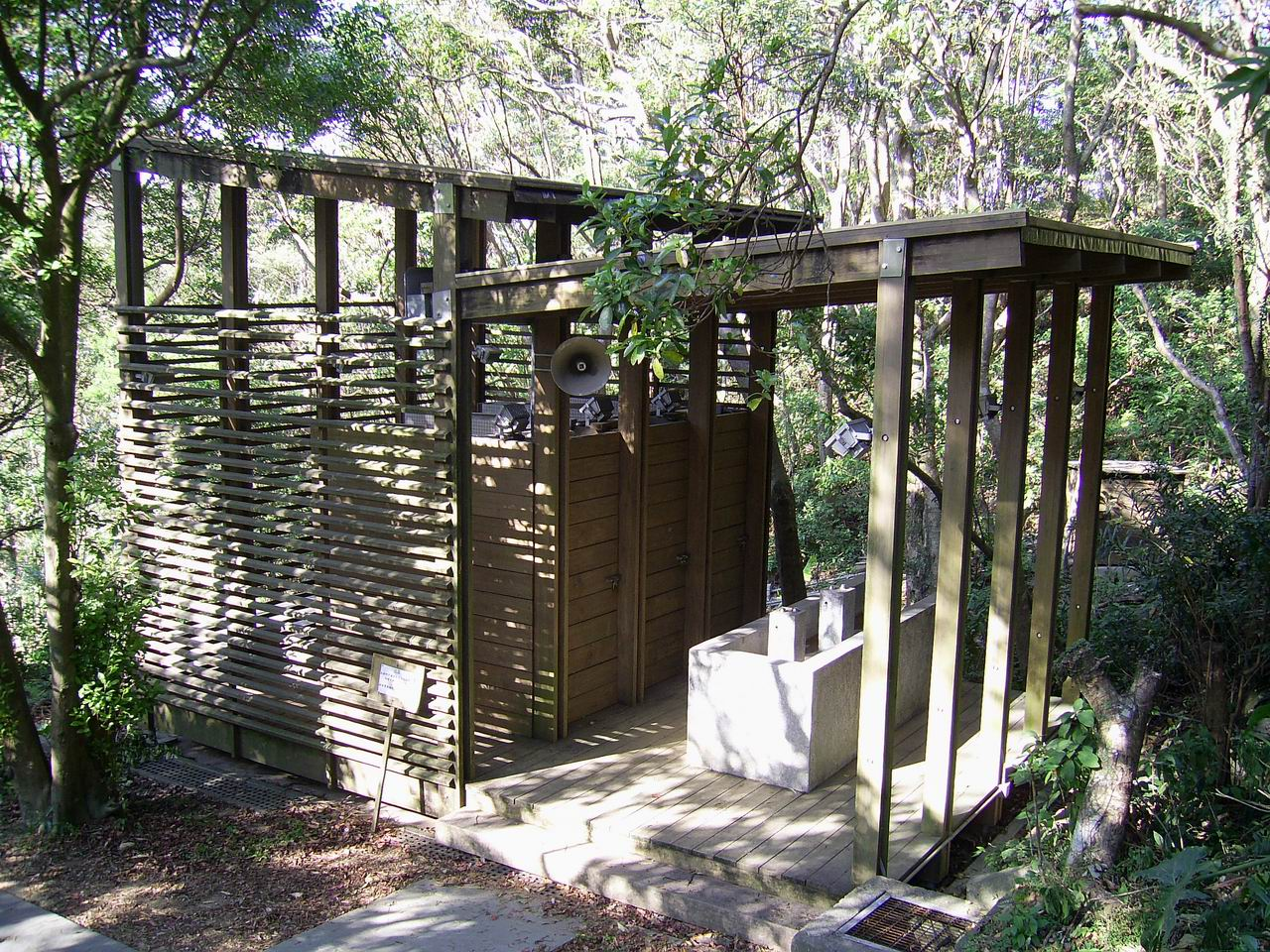 中文（香港）: 基維爾營地洗手間